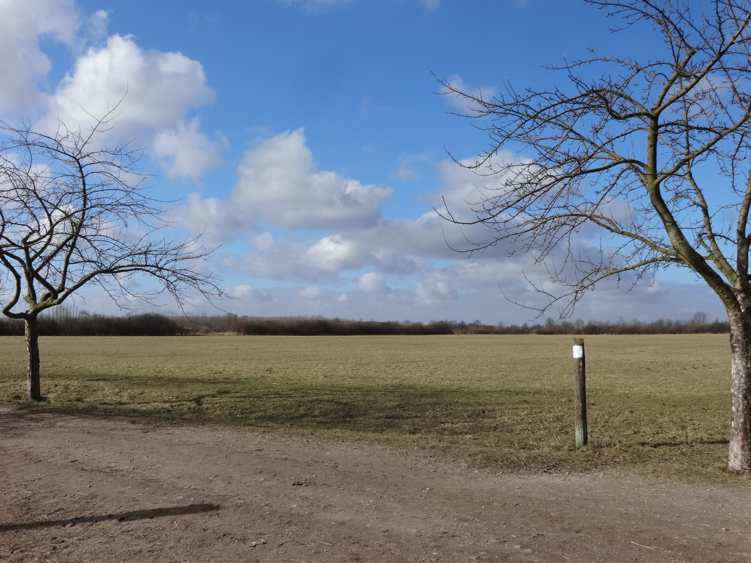 Das NSG Falkenberger Rieselfelder besteht seit 1995 auf den ehemaligen Rieselfeldern. Dort wurden bis Ende der 1960er Jahre die Abwässer aus Berlin verrieselt und dienten zur Düngung der Felder.